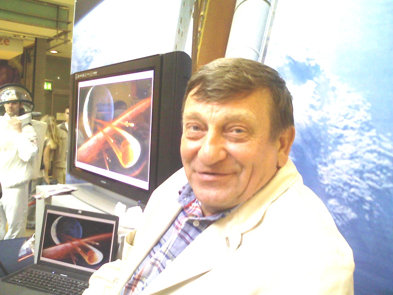 Mirosław Hermaszewski, Wrocław Galeria Dominikańska